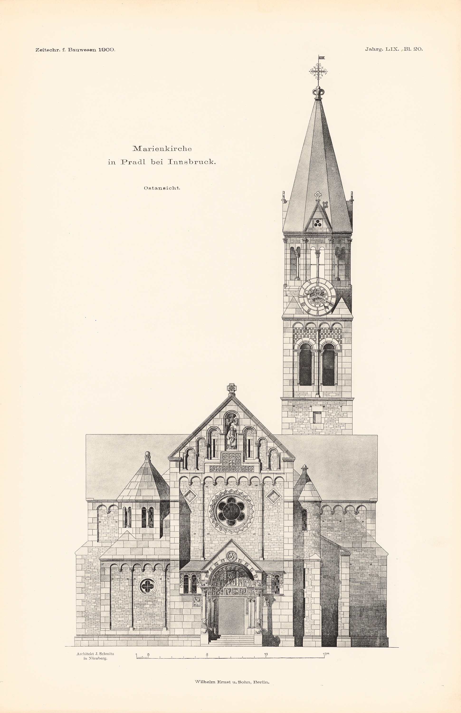 Schmitz Josef (1860-1936), Marienkirche, Innsbruck-Pradl. (Aus: Atlas zur Zeitschrift für Bauwesen, hrsg. v. Ministerium der öffentlichen Arbeiten, Jg. 59, 1909): Ansicht von Süden, Schnitt durch Querschiff und Seitenschiff, Längsschnitt. Druck auf Papier, 45,9 x 29,7 cm (inkl. Scanrand). Architekturmuseum der Technischen Universität Berlin Inv. Nr. ZFB 59,021.